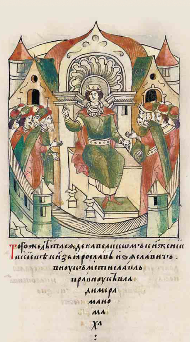 Ярослав Изяславович Лицевой летописный свод (том 2 страница 531)